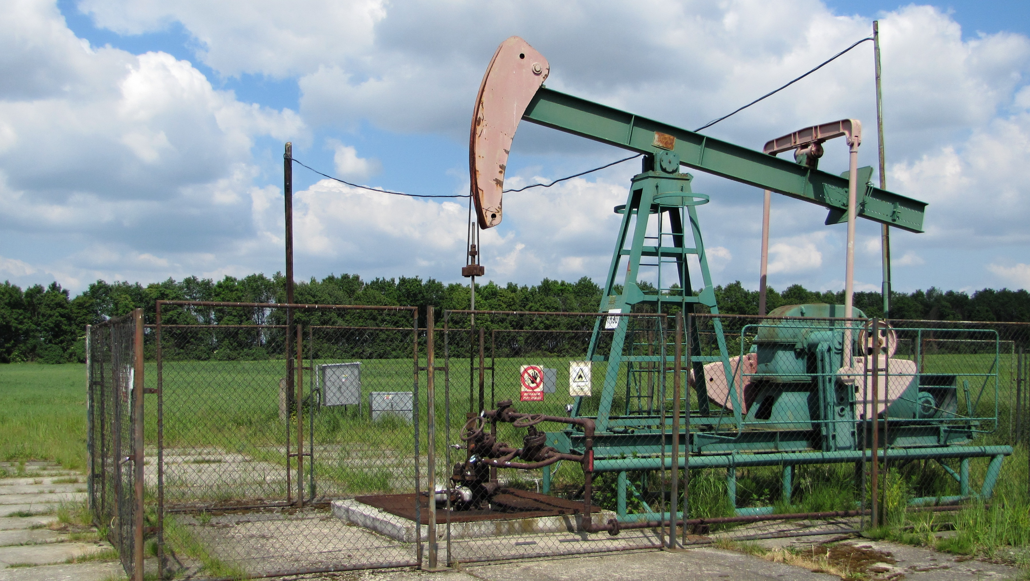 Těžba ropy ve Vracově